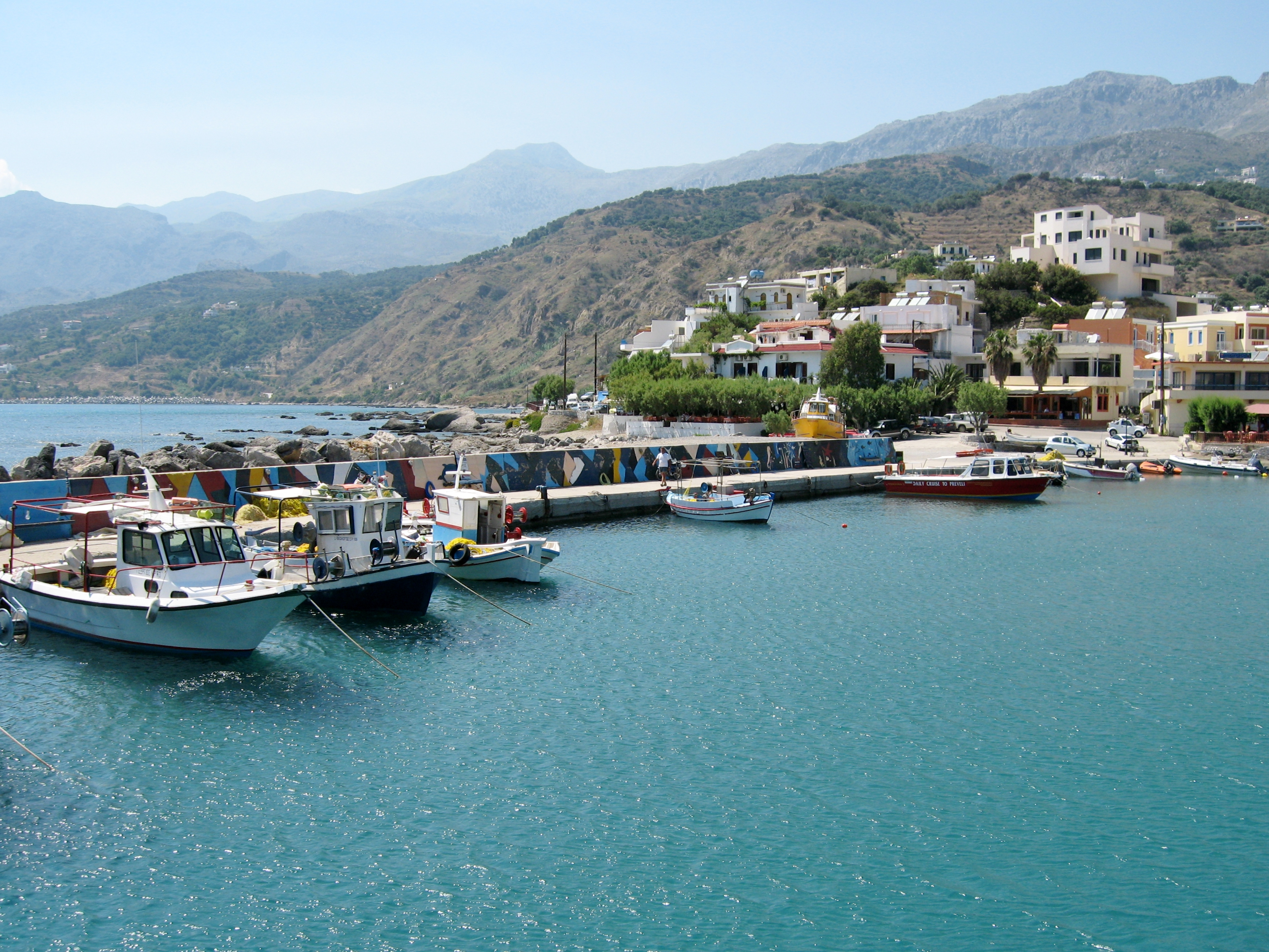 Hafen von Plakias, Gemeinde Agios Vasilios, Regionalbezirk Rethymno, Kreta, Griechenland